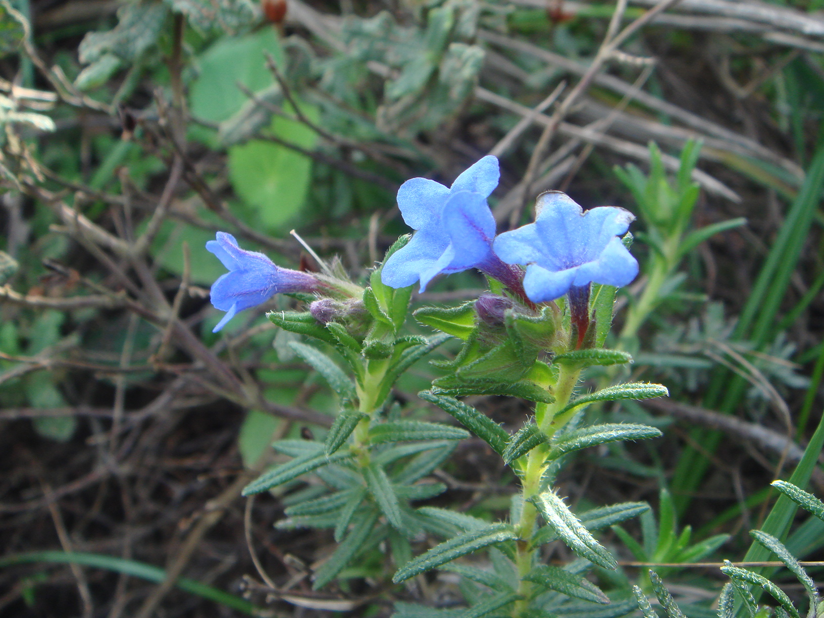 Litodora (Lithodora prostrata (Loisel.) Griseb.) subsp. lusitanica) Ceuta, España